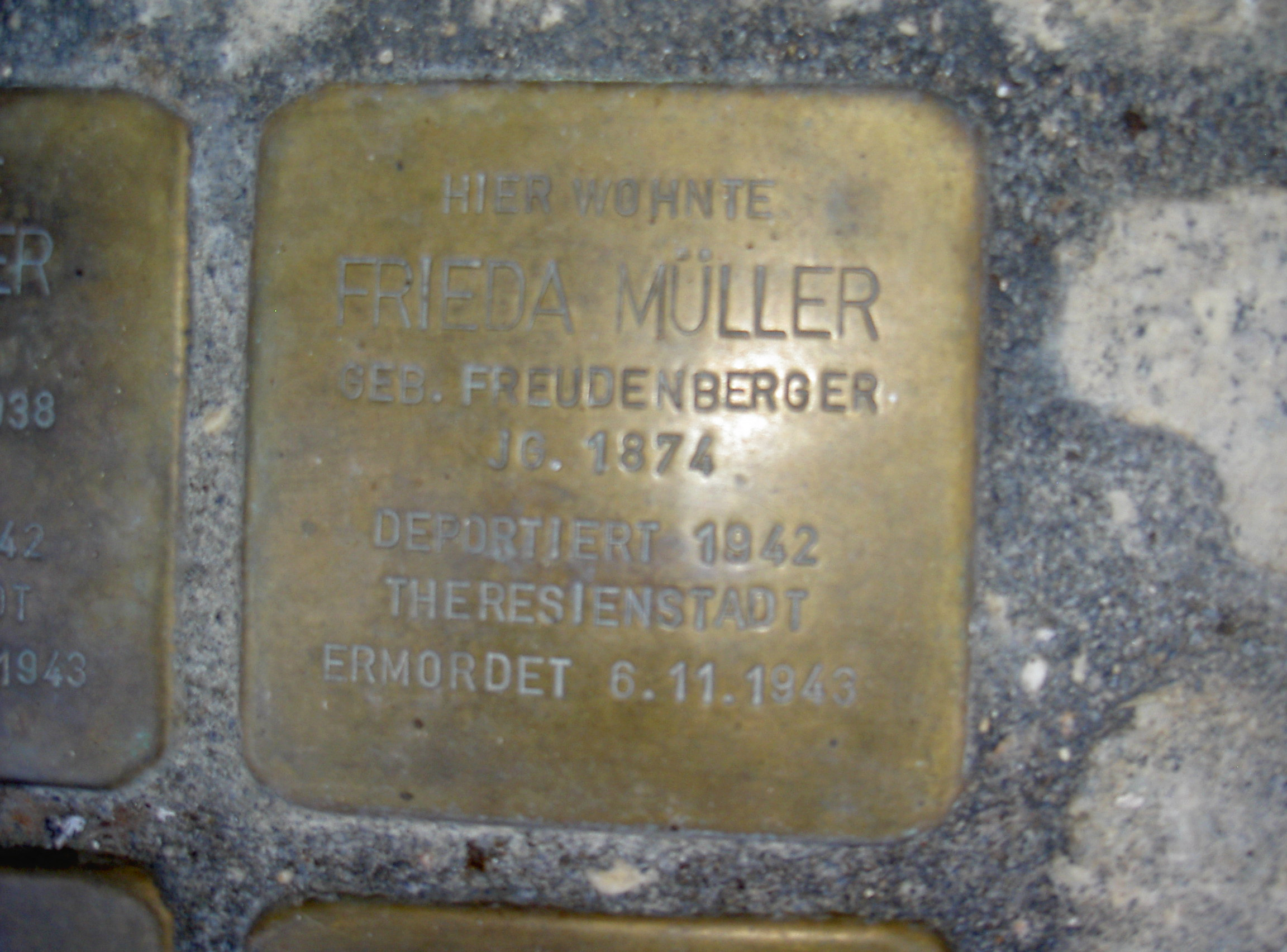 Stolperstein in Themar Müller Frieda